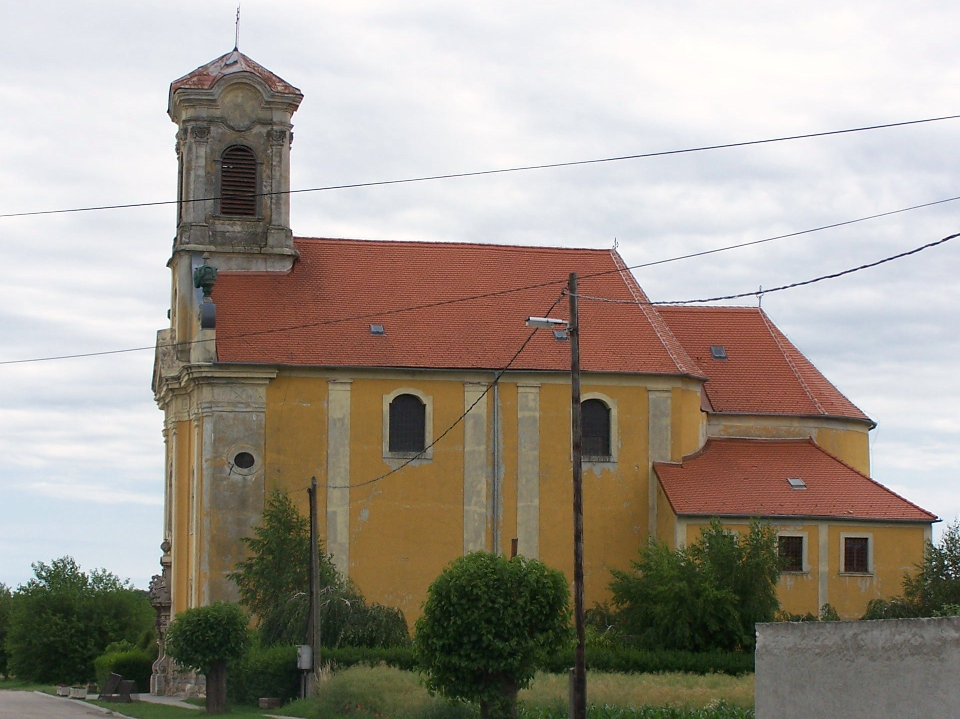 R. k. kegytemplom (Kópháza, Kossuth Lajos utca)